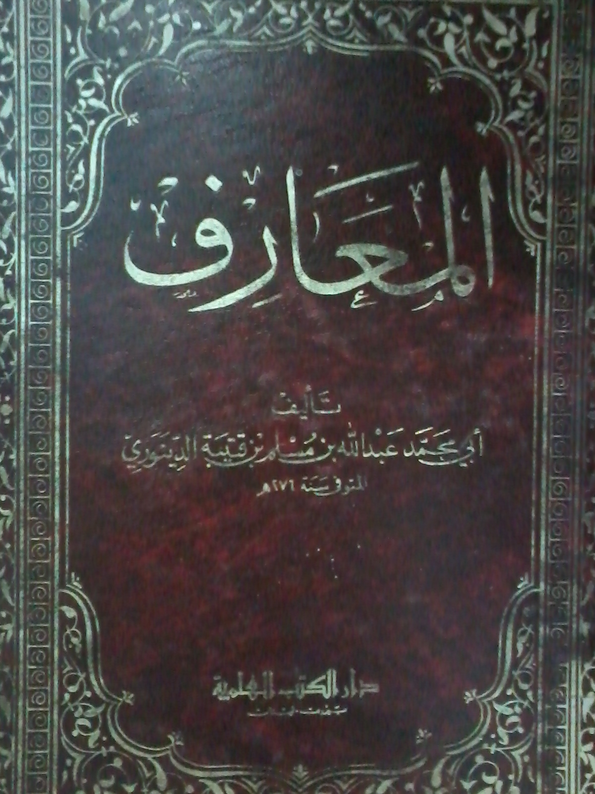 Al Ma'arif merupakan karangan terkenal milik Ibnu Qutaibah